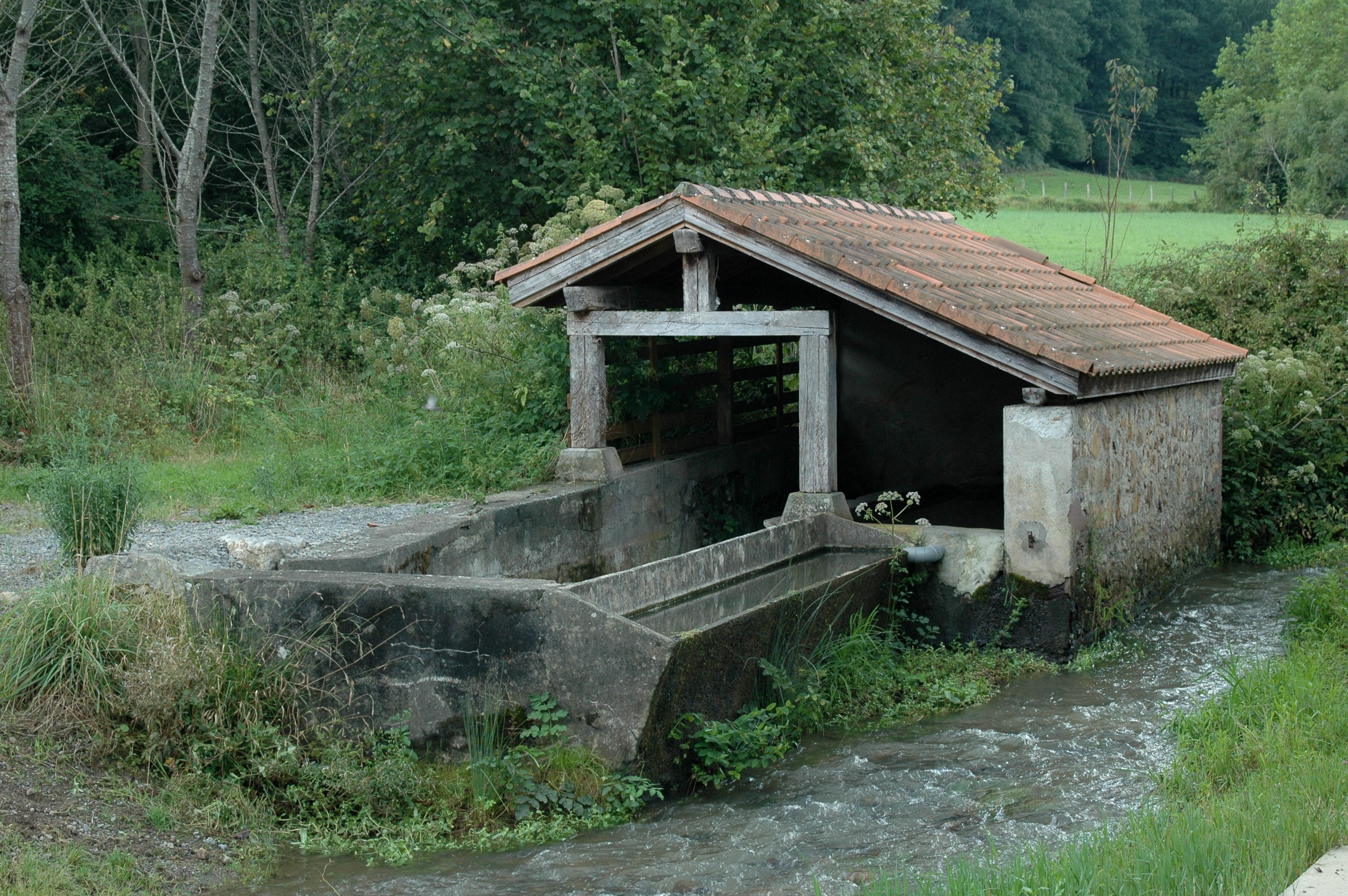 Anhaux - Le lavoir